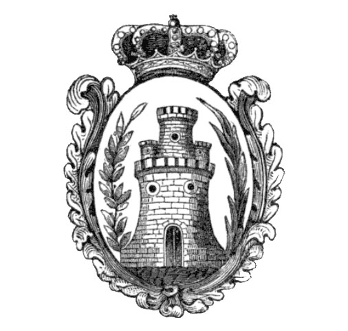 Escudo de la localidad de Algeciras publicado y descrito en la obra Manual de la provincia de Cádiz de Luis de Igartuburu en 1847. Según esta fuente [1]